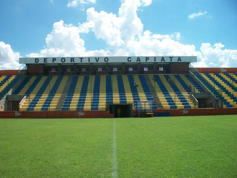 Cancha del Club Deportivo Capiatá.